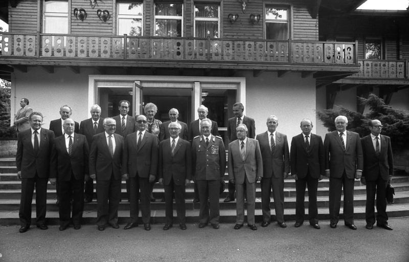 Hubertusstock, Jaruzelski-Besuch ADN-ZB/Mittelstädt 16.9.87 Berlin: Jaruzelski-Besuch Der Generalsekretär des ZK der SED und Vorsitzende des Staatsrates der DDR, Erich Honecker, und der Erste Sekretär des ZK der PVAP und Vorsitzende des Staatsrates der VRP, Wojciech Jaruszelski (vorn 4.v.l.), sowie weitere Mitglieder der beiden Delegationen stellten sich nach den Gesprächen im Jagdschloß Hubertusstock zu einem Gruppenfoto. [1. Reihe, v.l.: Günter Schabowski, Kurt Hager, Horst Sindermann, Jaruzelski, Erich Honecker, Heinz Keßler, Erich Mielke, Werner Jarowinski; 2.v.r.: Günter Mittag,] Abgebildete Personen: Mielke, Erich: Minister für Staatssicherheit, Armeegeneral, Politbüro des Zentralkomitees (ZK) der SED, DDR (GND 118977490) Honecker, Erich: Staatsratsvorsitzender, Generalsekretär des ZK der SED, DDR (GND 118553399) Jaruzelski, Wojciech: Staatspräsident, General, Polen Schabowski, Günter: Sekretär Bezirksleitung Berlin der SED, Chefredakteur des Neuen Deutschlands (ND), DDR Hager, Kurt: Mitglied des Politbüros des ZK der SED, Staatsratsmitglied, DDR (GND 119385511) Sindermann, Horst: Volkskammerpräsident, stellvertretender Staatsratsvorsitzender, DDR Keßler, Heinz: Minister für Verteidigung, Armeegeneral, DDR (GND 119196719) Jarowinsky, Werner: Mitglied des Politbüros des ZK der SED, DDR (GND 104697288) Mittag, Günter Dr.: Stellvertretender Staatsratsvorsitzender, Politbüro des ZK der SED, FDGB, DDR (GND 11897629X)